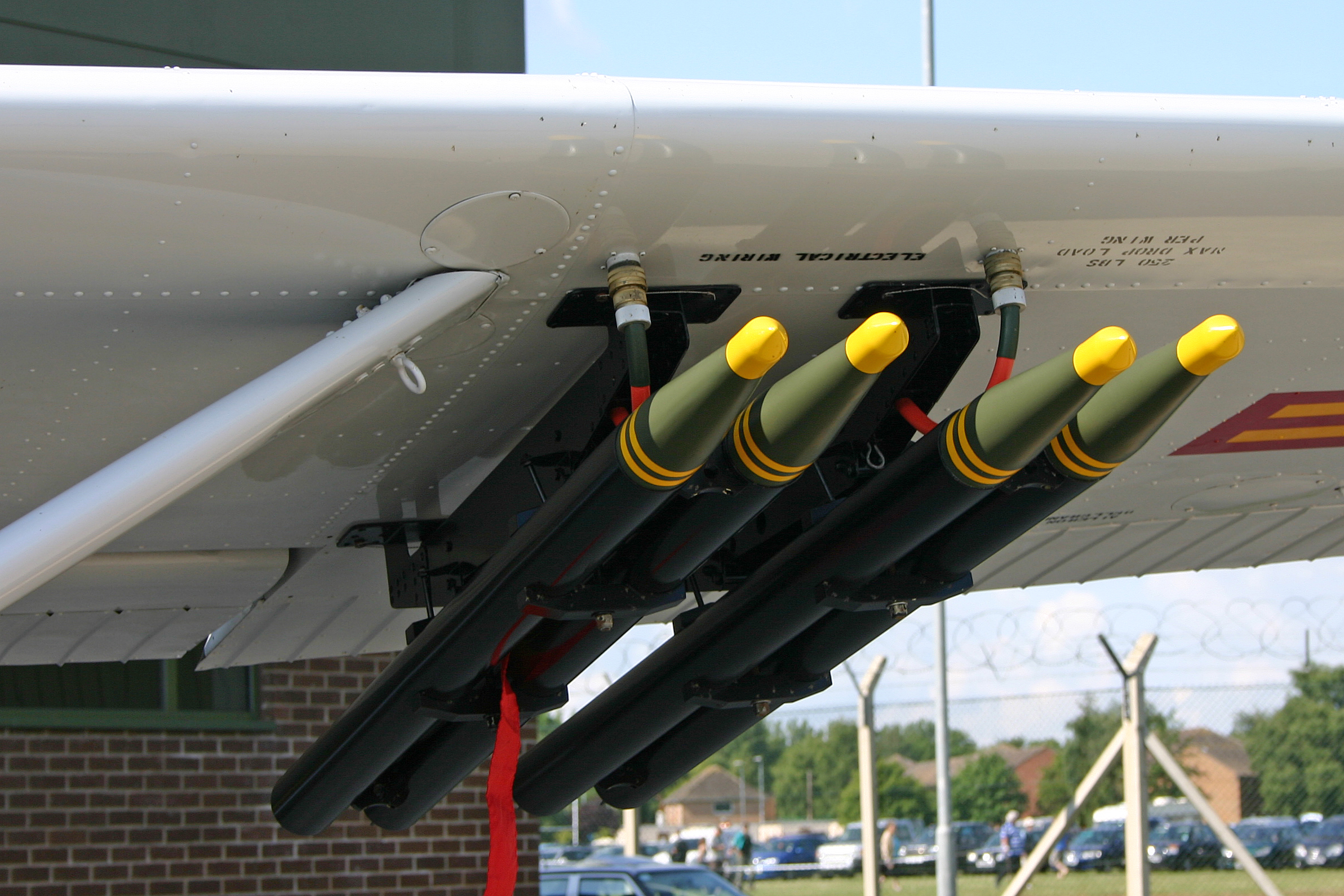 Wing detail.